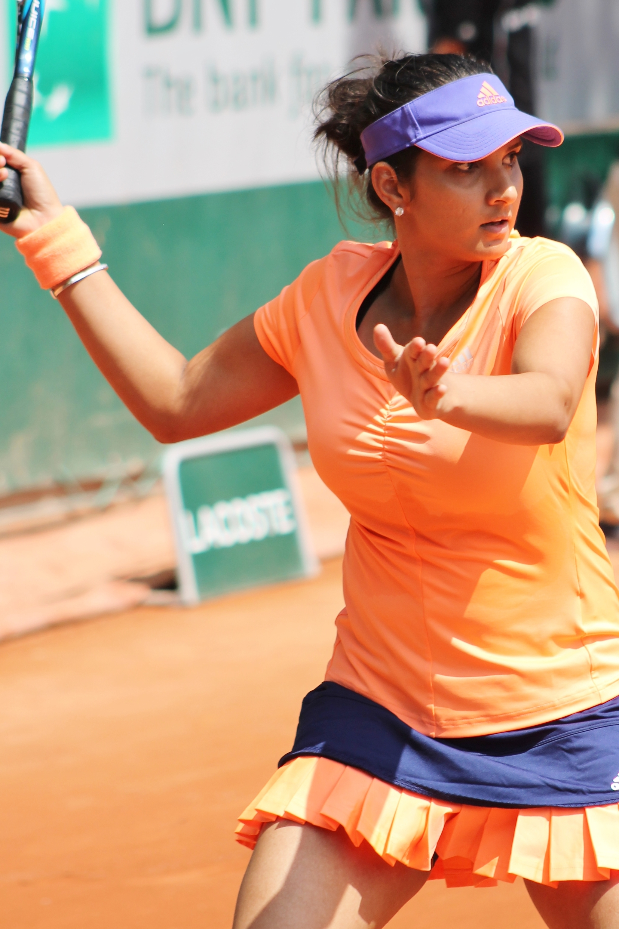 Mirza RG15 (3)